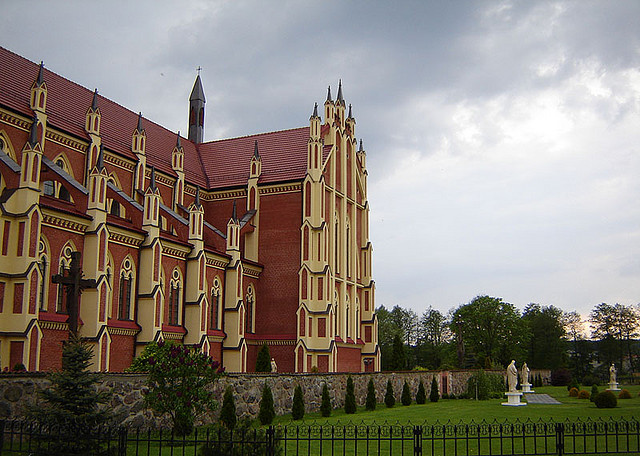 Беларуская (тарашкевіца): Гервяты